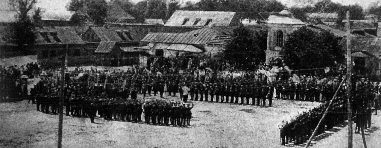 Беларуская (тарашкевіца): Шыхт Пінска-Валынскага добраахвотнага батальёну